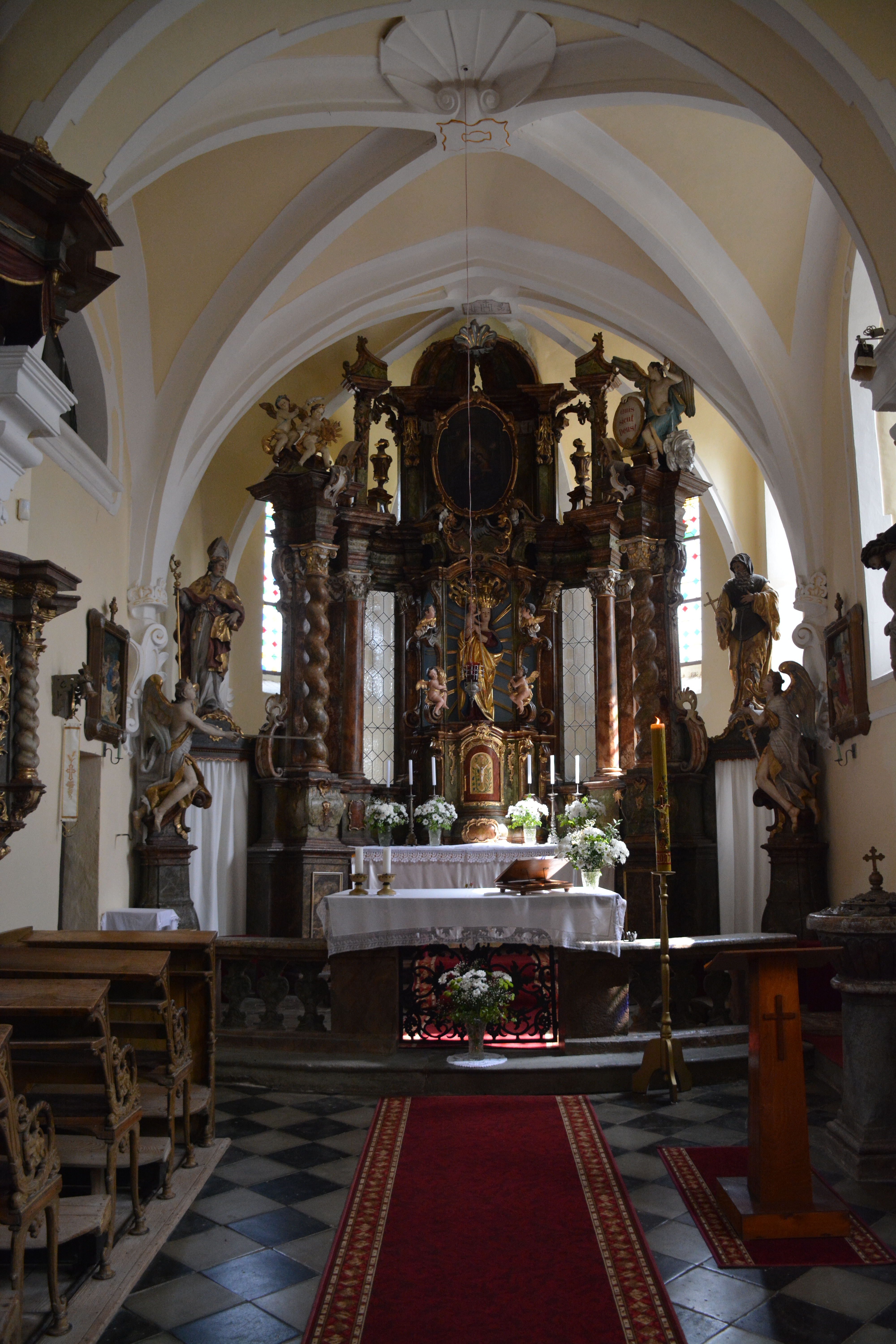 Pohled na presbyterium